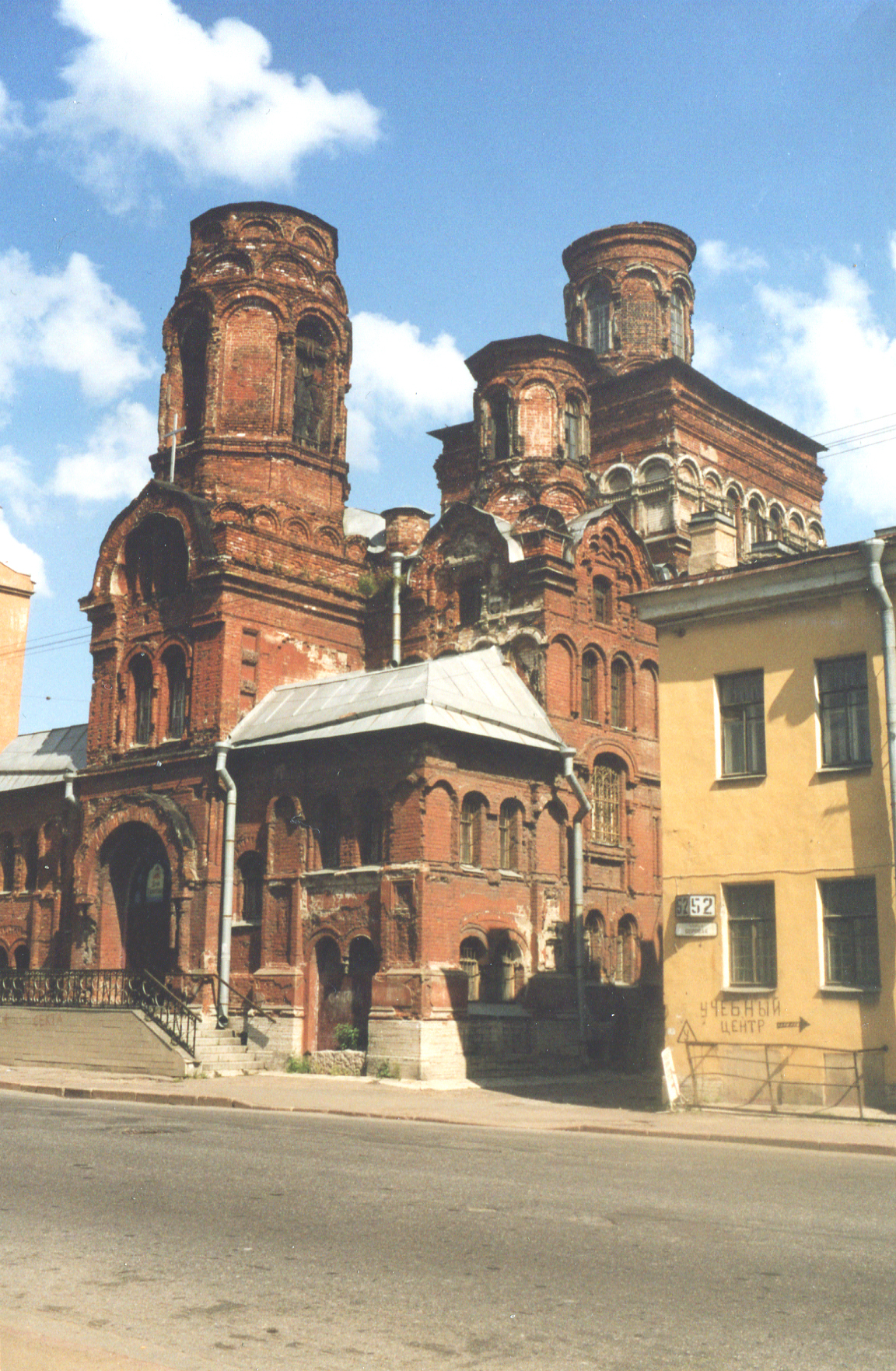 Покровская церковь в Санкт-Петербурге. [1], [2]